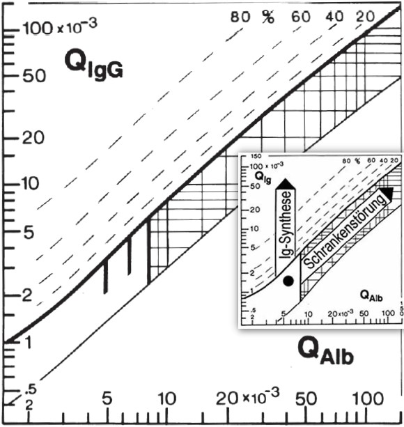 Quotientendiagramm zur Beurteilung der Immunglobuline im Liquor cerebrospinalis.